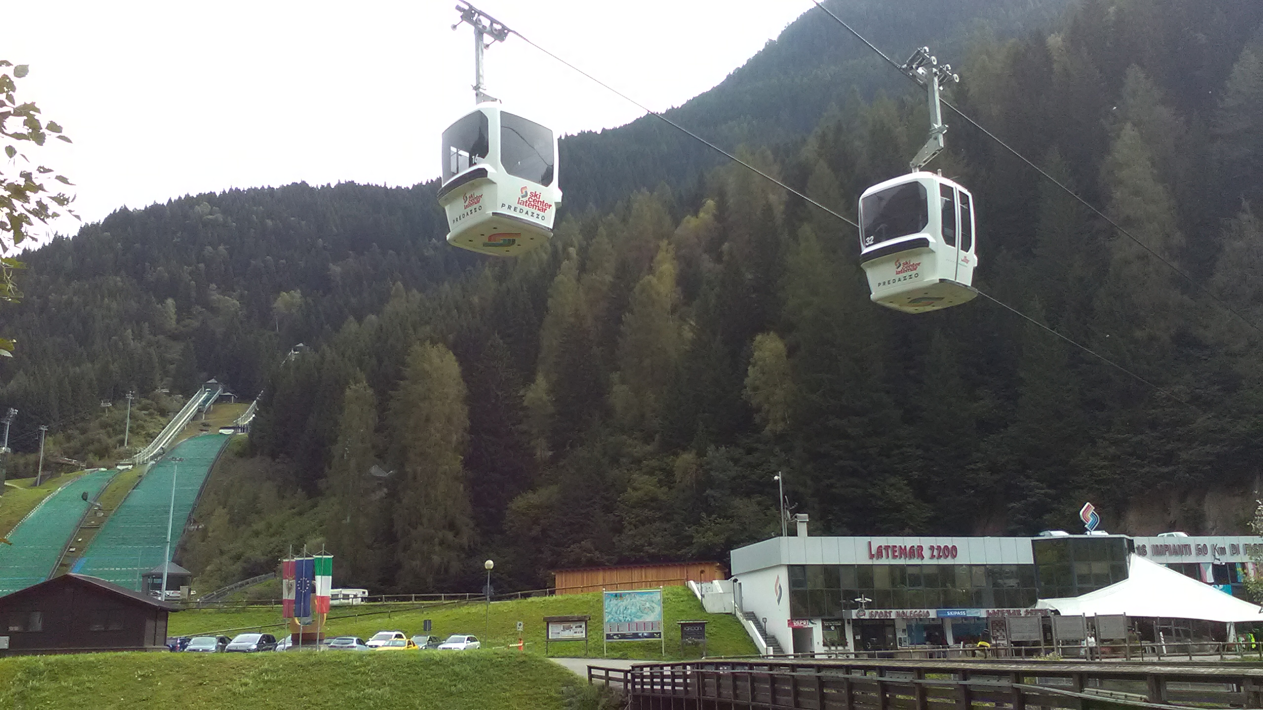 Ski Center Latemar 2000 (Predazzo)